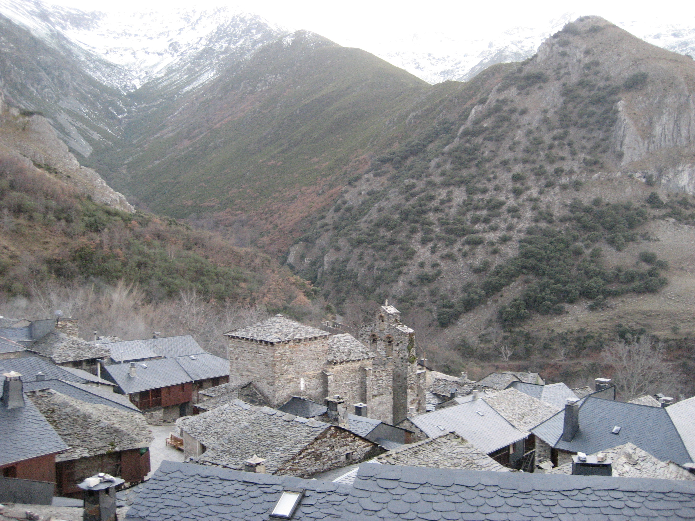 Pueblo e iglesia de Peñalba de Santiago